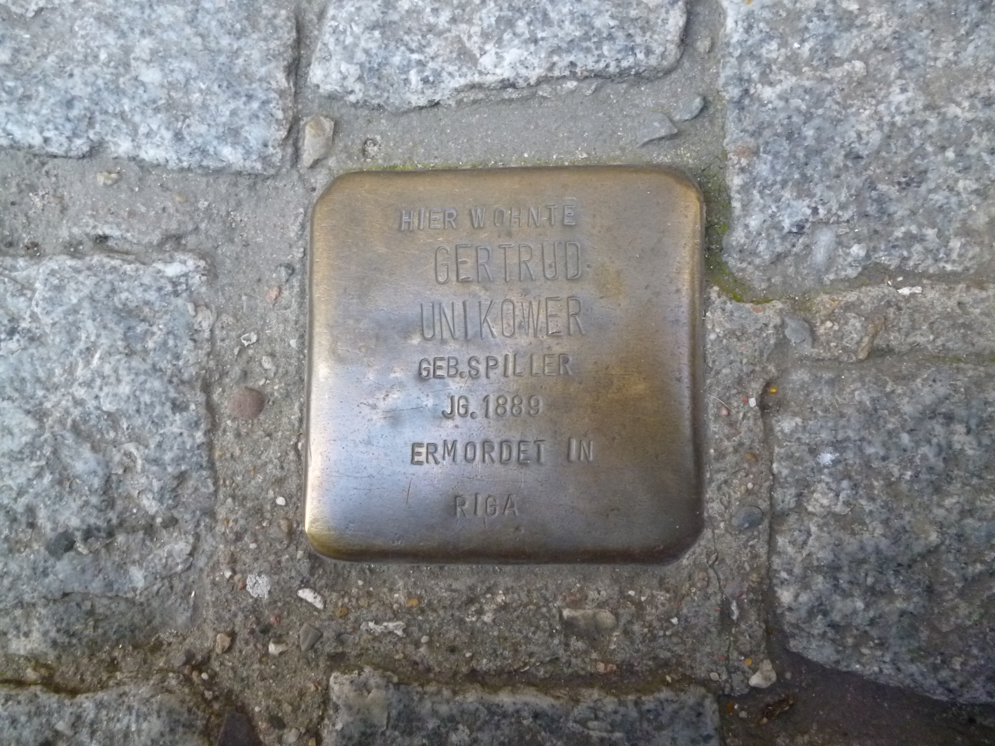 Stolperstein von Gertrud Unikower, verlegt in Flensburg